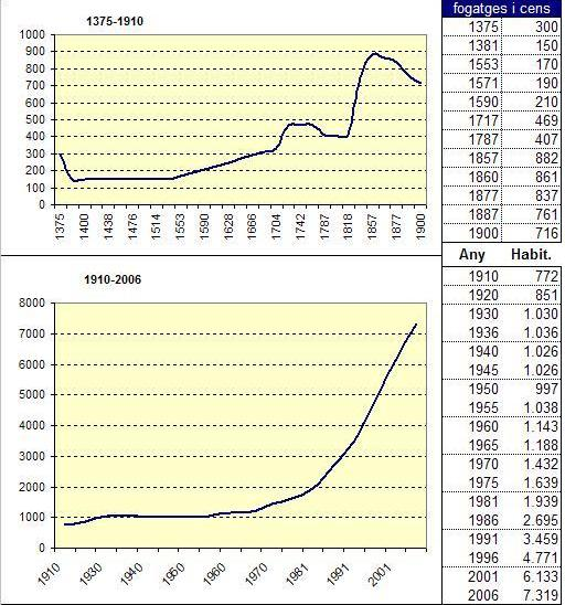 evolució demogràfica l'Ametlla del Vallès (Vallès Oriental-Catalunya)